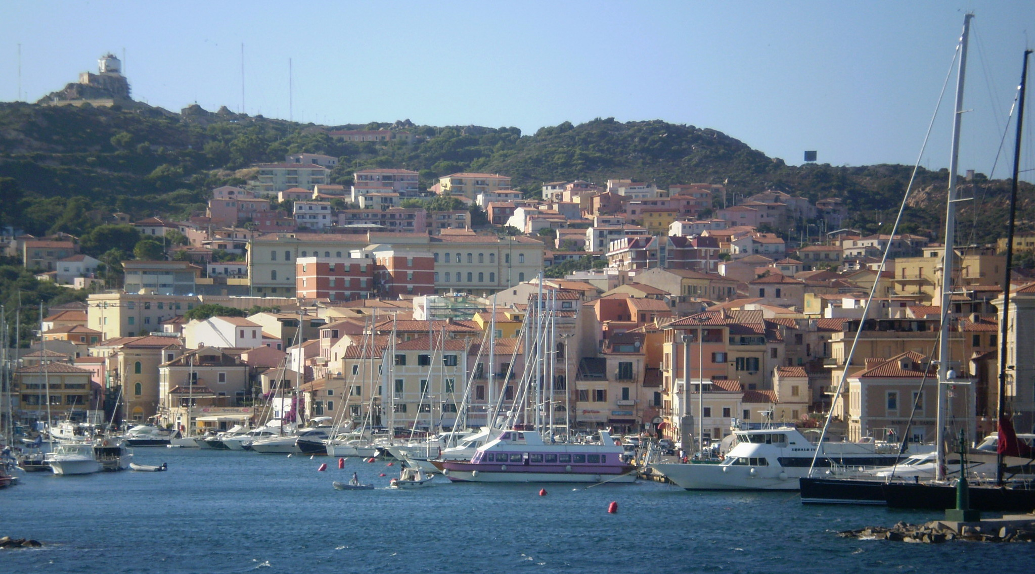 Cala Gavetta parco nazionale dell'arcipelago della maddalena